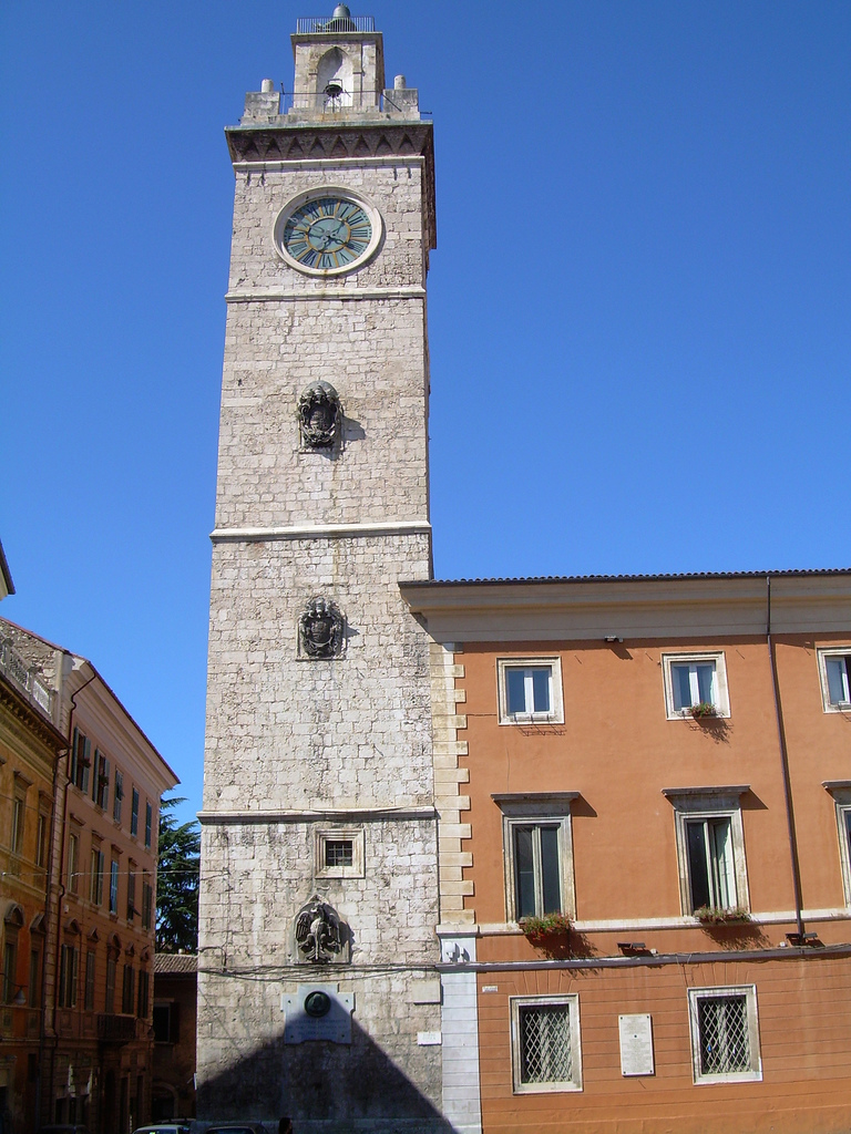 Palazzo Margherita in L'Aquila: particolare della torre civica